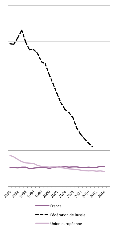 Quatre graphiques comparant l'évolution sur longue période des avortements en Russie et dans d'autres pays d'Europe ou d'Asie centrale - Pays concernés en légende du graphique Source : OMS